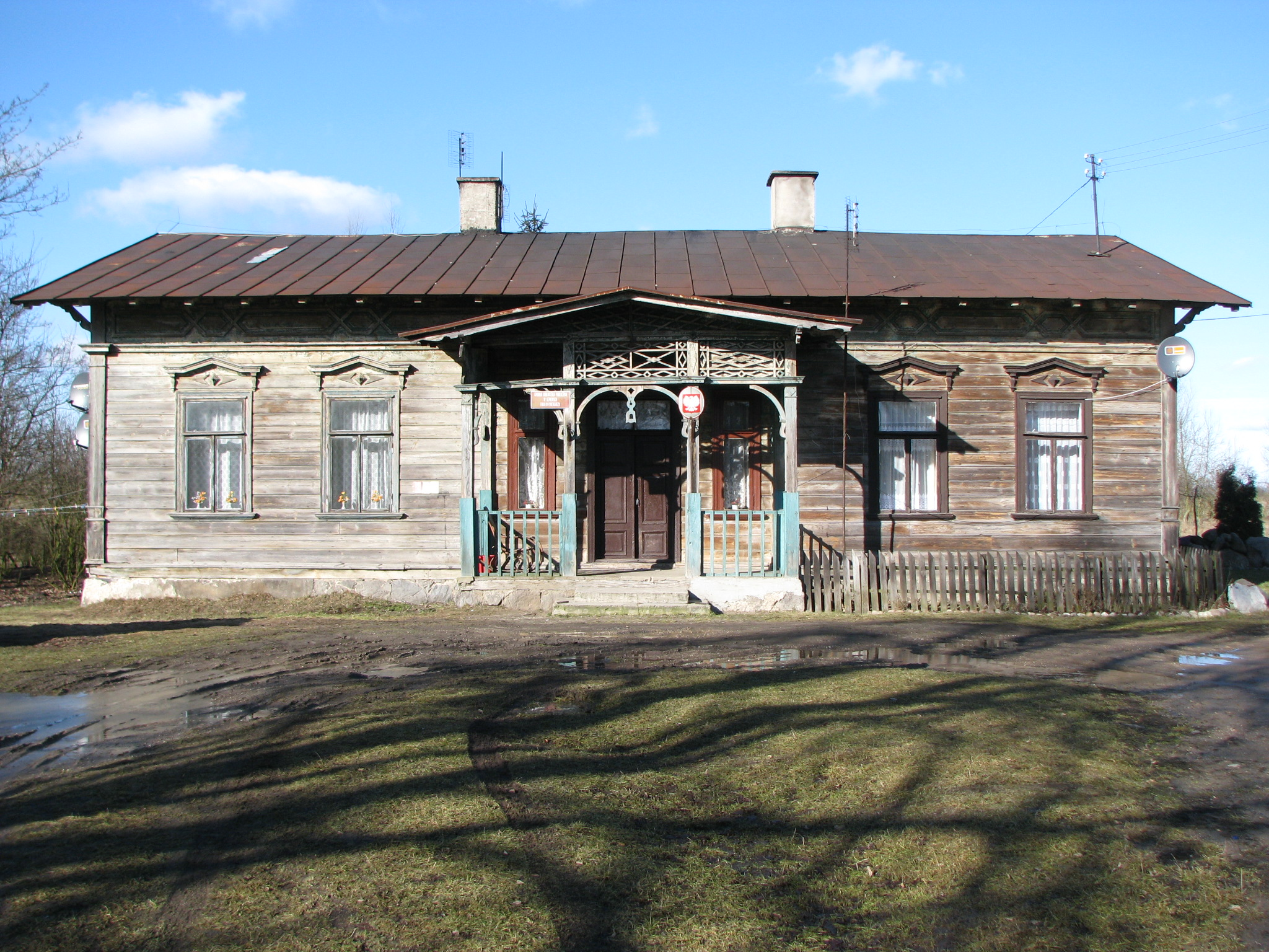 Liberadz dwór drewniany, 1889 08.2015.